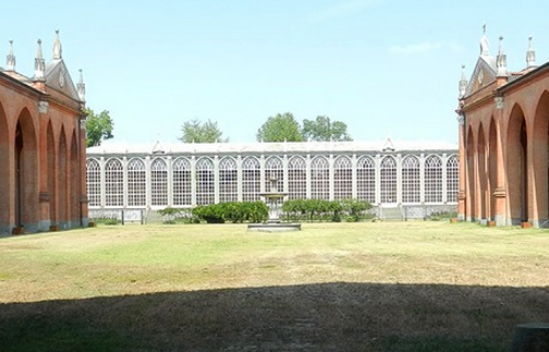 Racconigi - Cortile della Margaria del Castello Reale: dettaglio della fontana monumentale